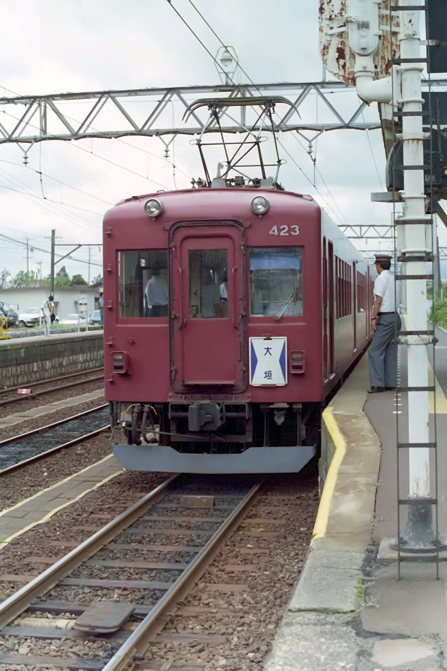 近鉄 モ423 西大垣駅